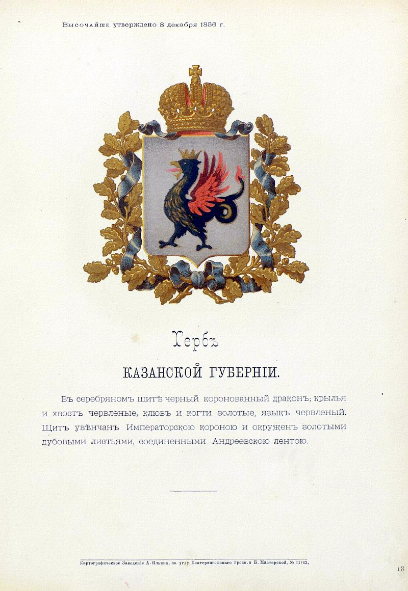 Official Russian Empire coat of arms Kazan Governorate. Герб Российской Империи Казанской губернии с официальным описанием в Гербовнике Бенке. Утверждён Императором Всероссийским Александром Вторым.